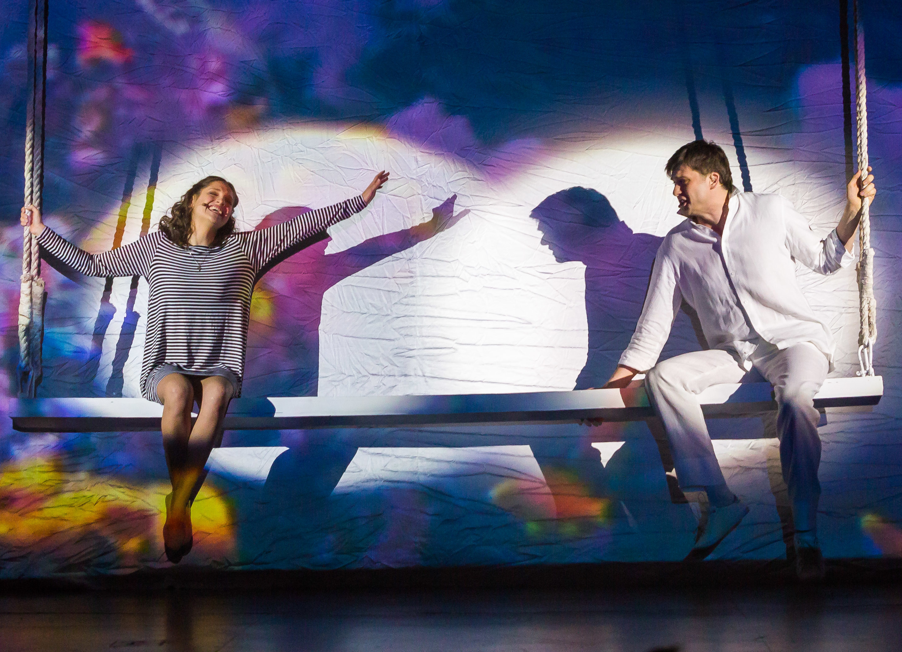 Мария Иващенко и Георгий Колдун в мюзикле «Алые паруса», 2019